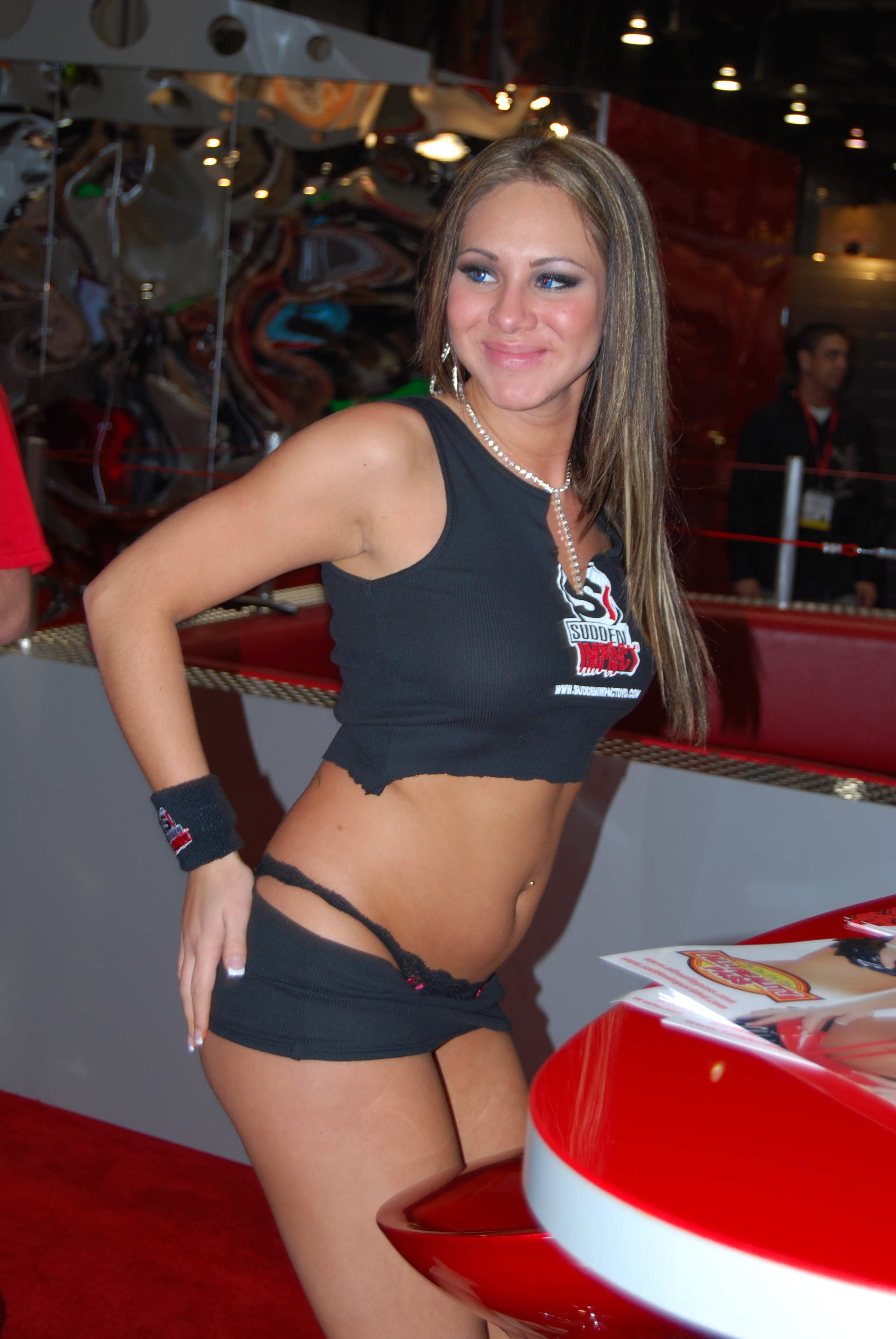 AEE2008_Nikon_Day1 403